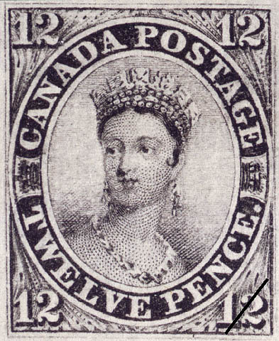 Timbre poste de la province du Canada